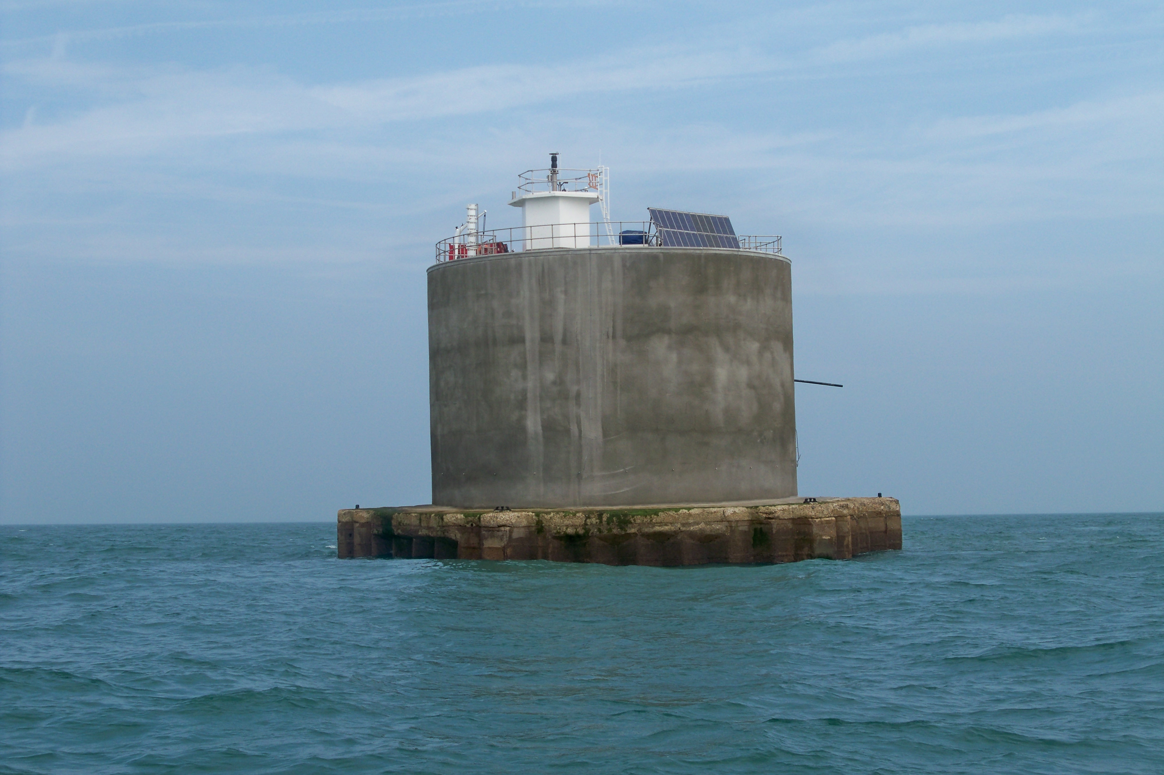 Le Tout de Nab apres les reparations 2012